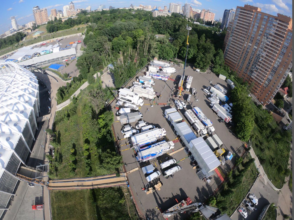 Die TVN Group am 26. Mai 2018 als Produzent beim Champions-League-Finale für die Uefa in Kiew.